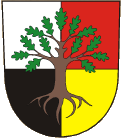 znak obce